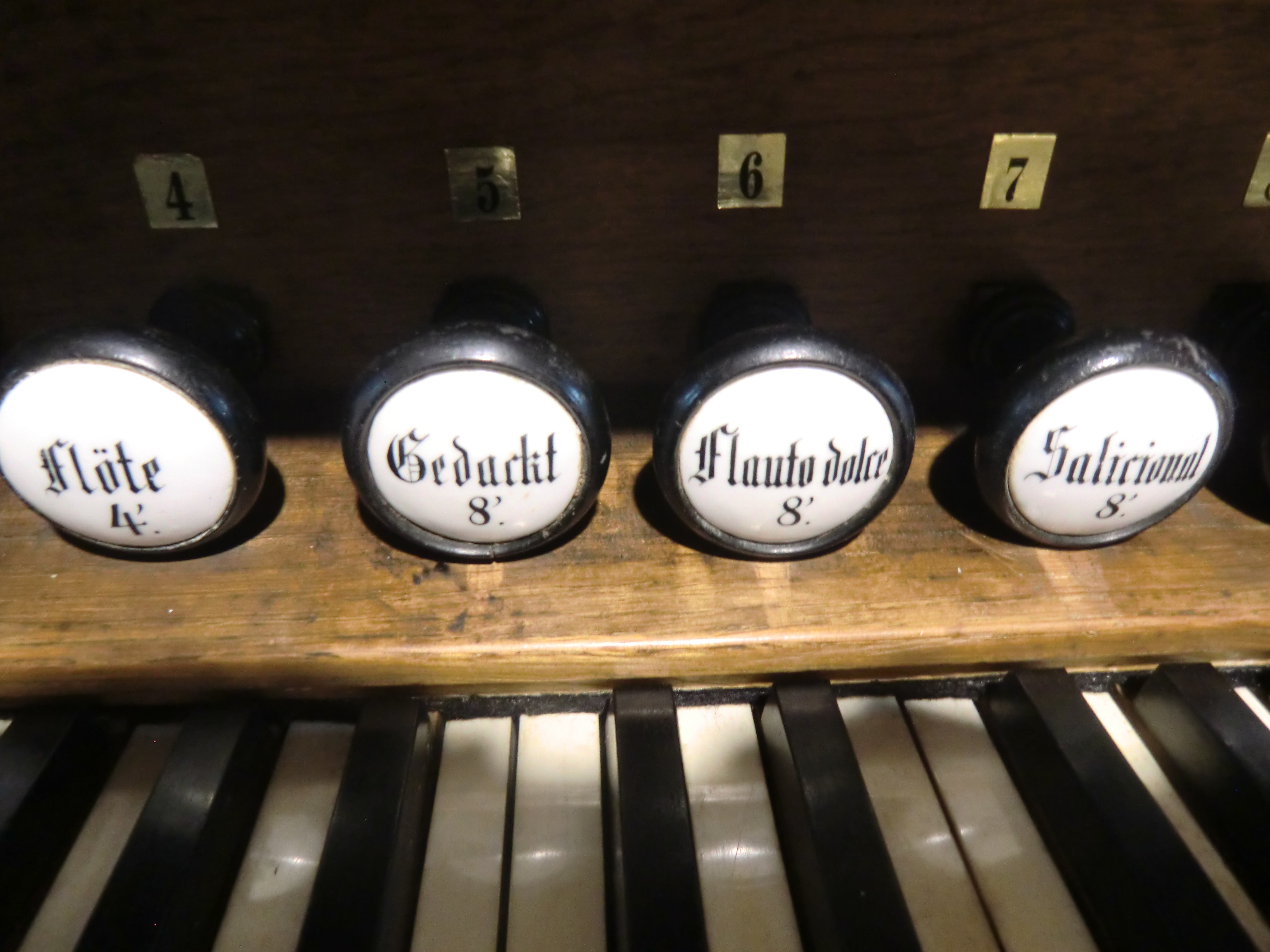 Keller-Orgel Kransberg (1876) - Spieltisch (Manurienzüge des Nebenwerkes [II. Man.])